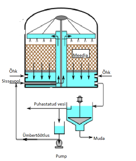 Biofiltri ehitus